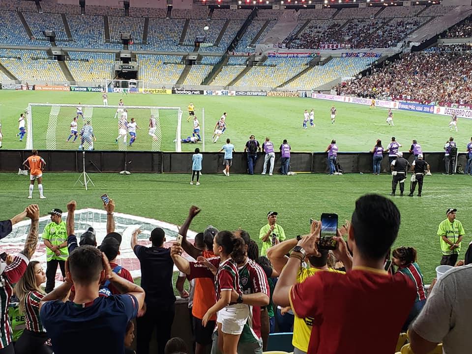 No Maracanã empate entre Fluminense e Fortaleza por 0 a 0 em 4 de dezembro de 2019, perante 39.965 torcedores, partida que garantiu vaga na Copa Sul-Americana de 2020 ao Fortaleza.